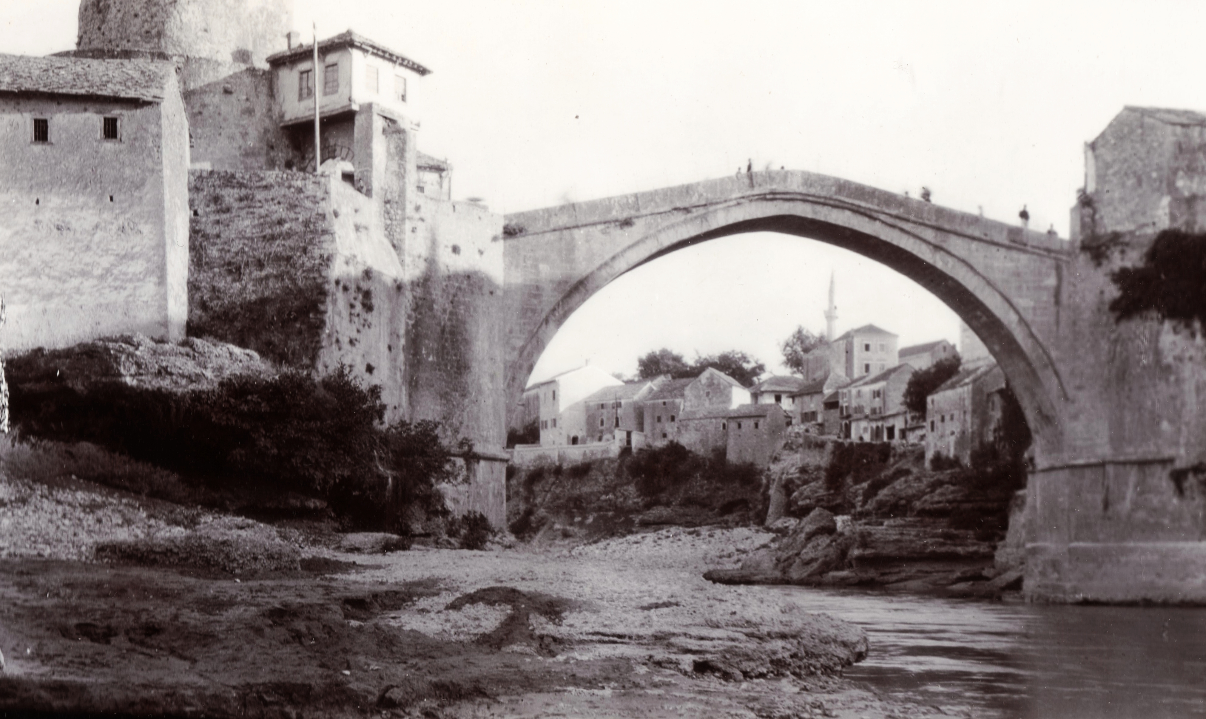 Öreg híd (Stari most) a Neretva folyón. Location: Bosnia and Herzegovina Tags: bridge, picture, shore, water surface, shore Title: Öreg híd (Stari most) a Neretva folyón.